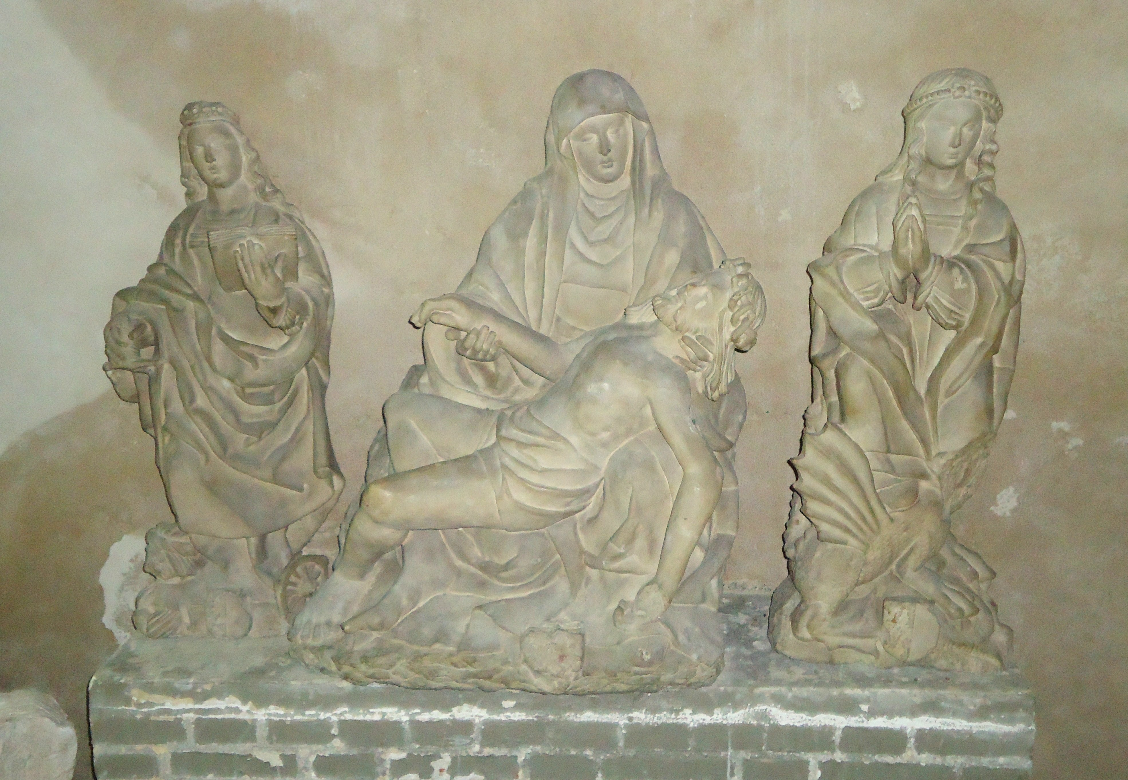 HUEST - Piéta du XVIe (OM) Eglise Saint-Pierre